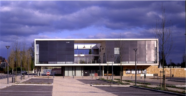 franqueville - mairie 2006 richard et schoeller architectes